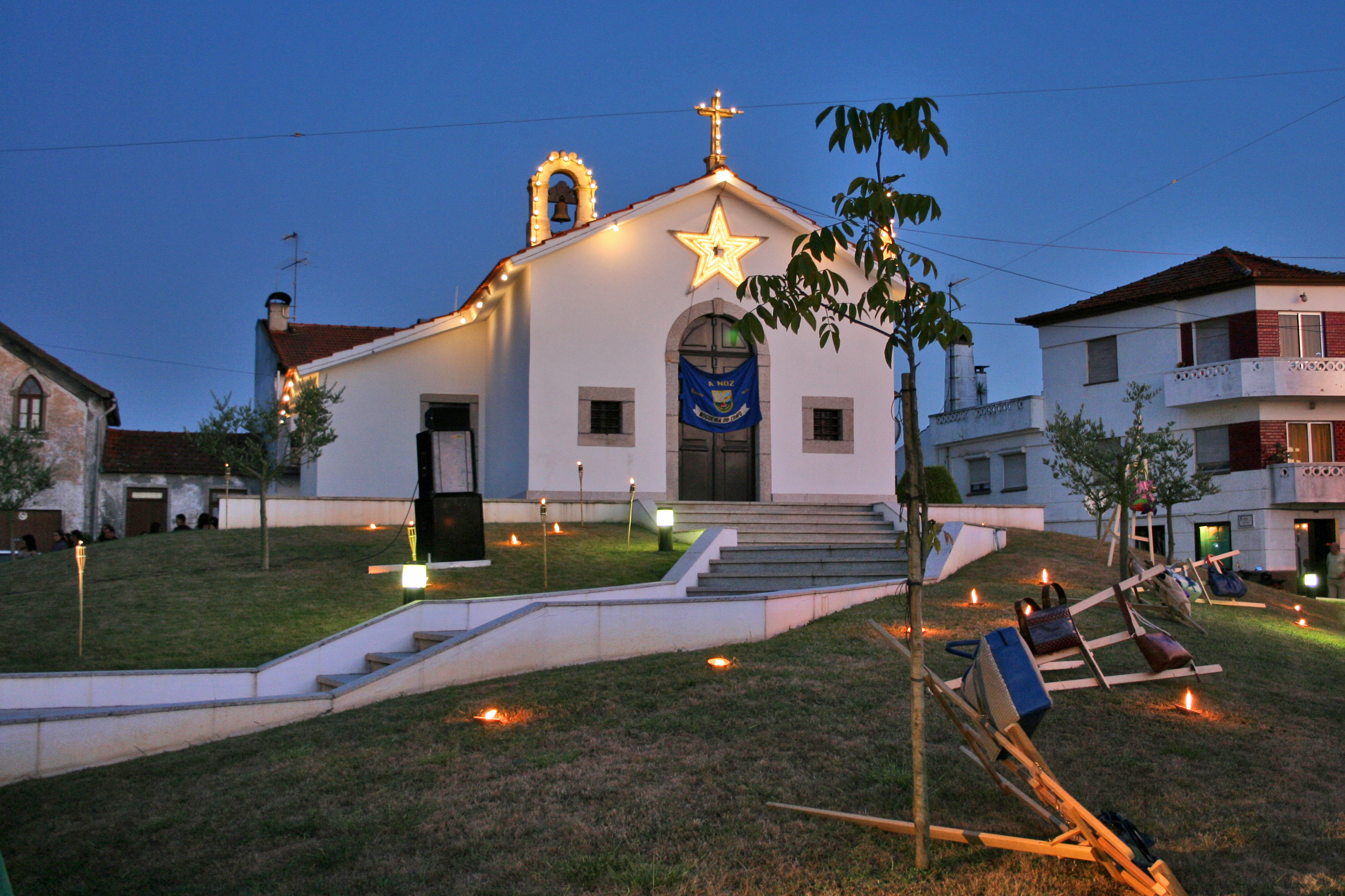 Capela de Santo Antão This file was uploaded for Wiki Loves Monuments in Portugal with the unique identifier 97008831.